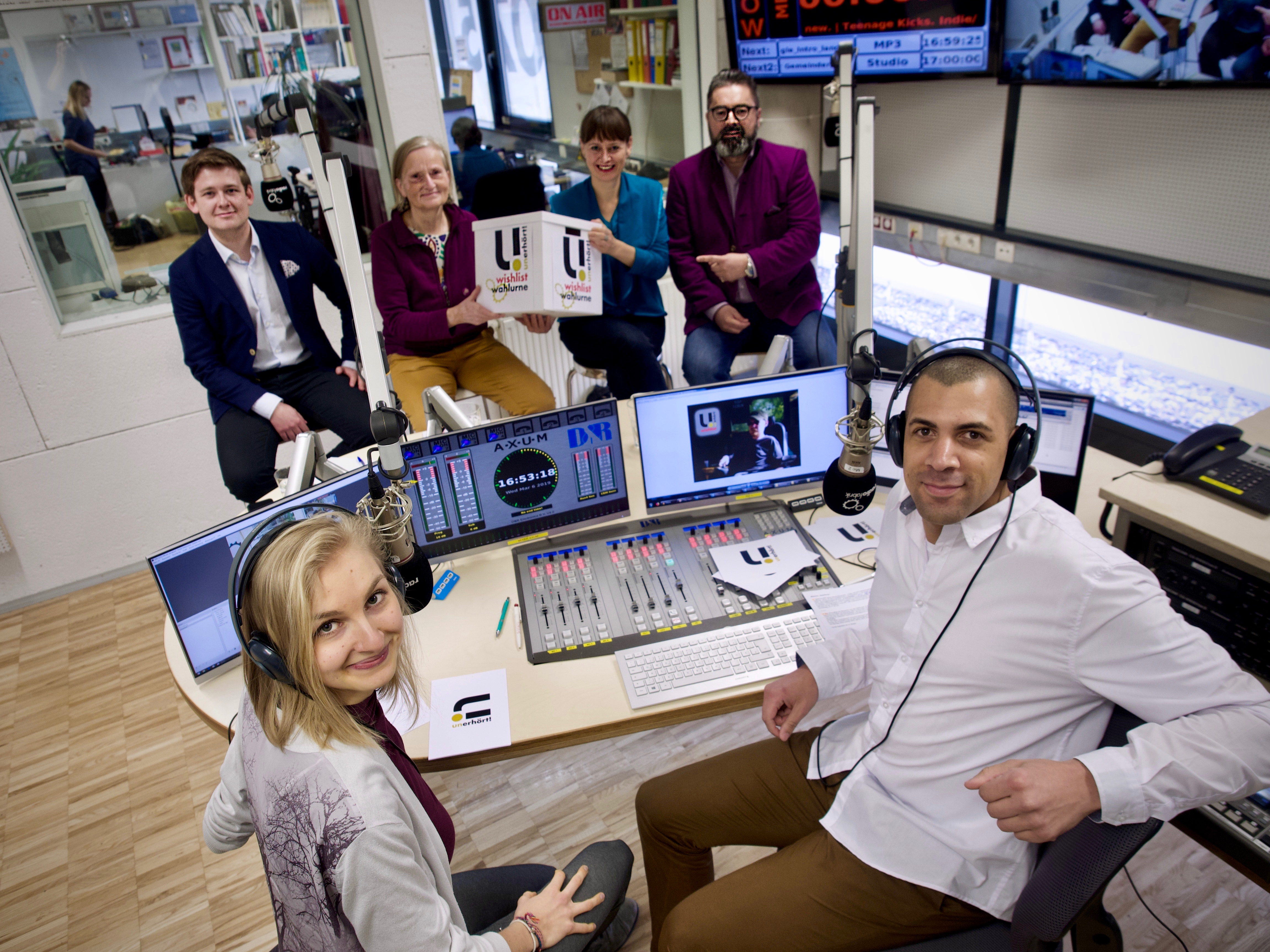 Guests, 6.3. – 17:00 – 18:15: Die Stadtpartei ÖVP (Harald Kratzer), FPÖ Salzburg-Stadt (Josef Bernhard Höllinger), DIE LINKE Salzburg (Hadwig Soyoye-Rothschädl), Bürgerliste – Die Grünen in der Stadt Salzburg (Martina Berthold) Moderation: Timna Pachner, Daniel Bergerweiss – unerhört-Redaktion (Photography: Henry Lûmí)